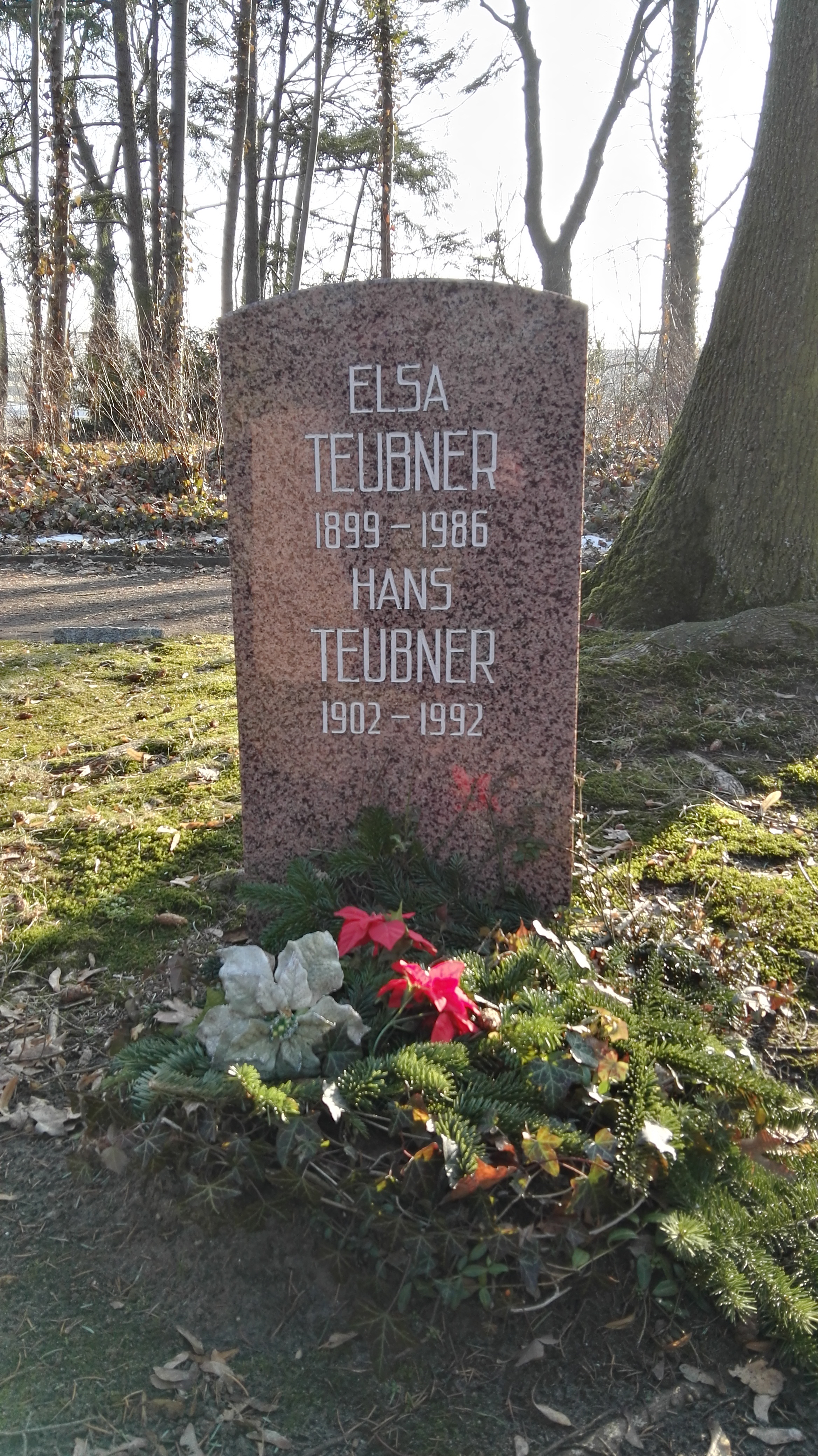 Grab von Hans Teubner und Elsa Teubner in der Grabanlage Pergolenweg auf dem Sozialistenfriedhof des Zentralfriedhofs Friedrichsfelde